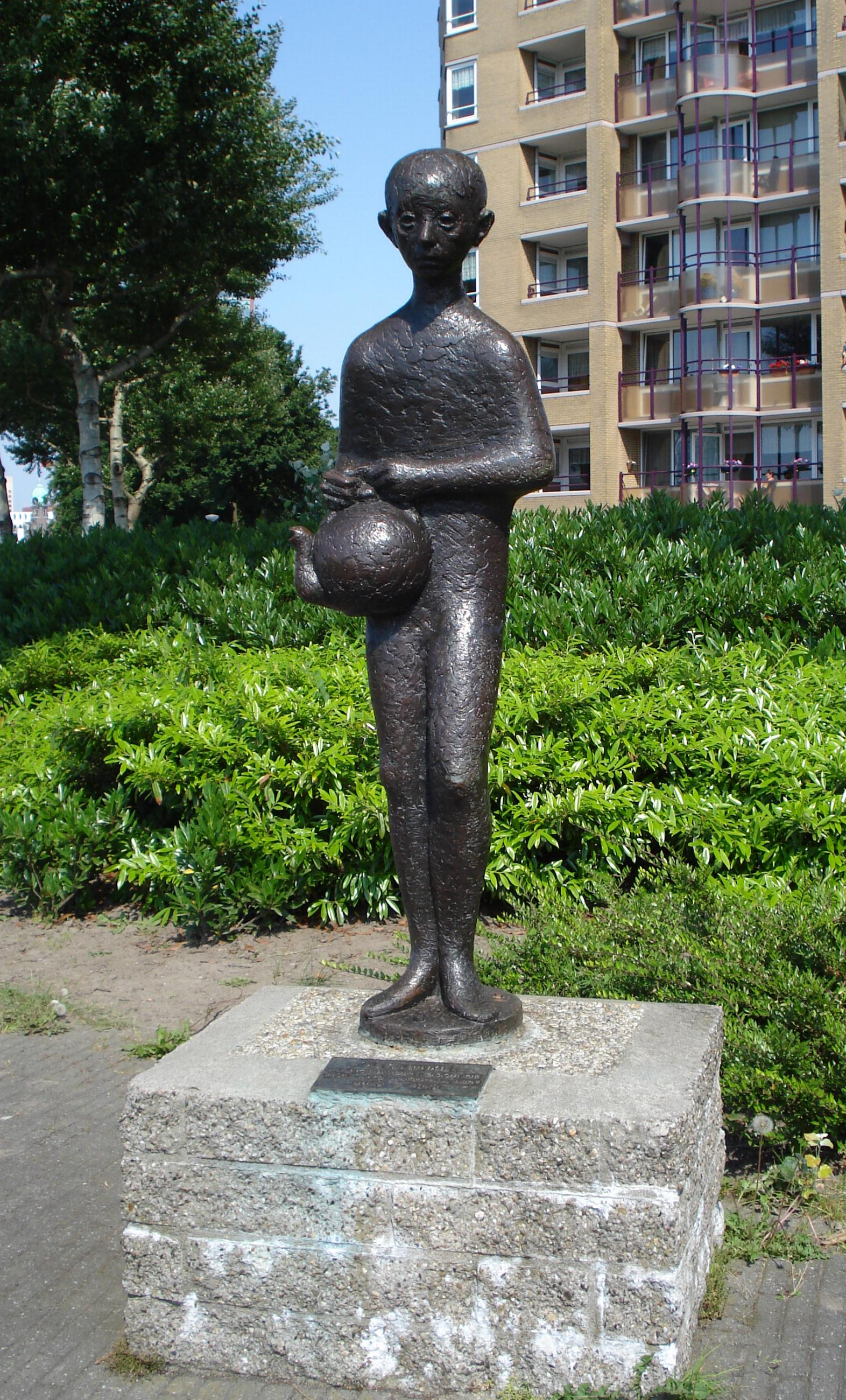 Rotterdam, Katendrecht. "Ketelbinkie" van Huib Noorlander. Rotterdam/The Netherlands